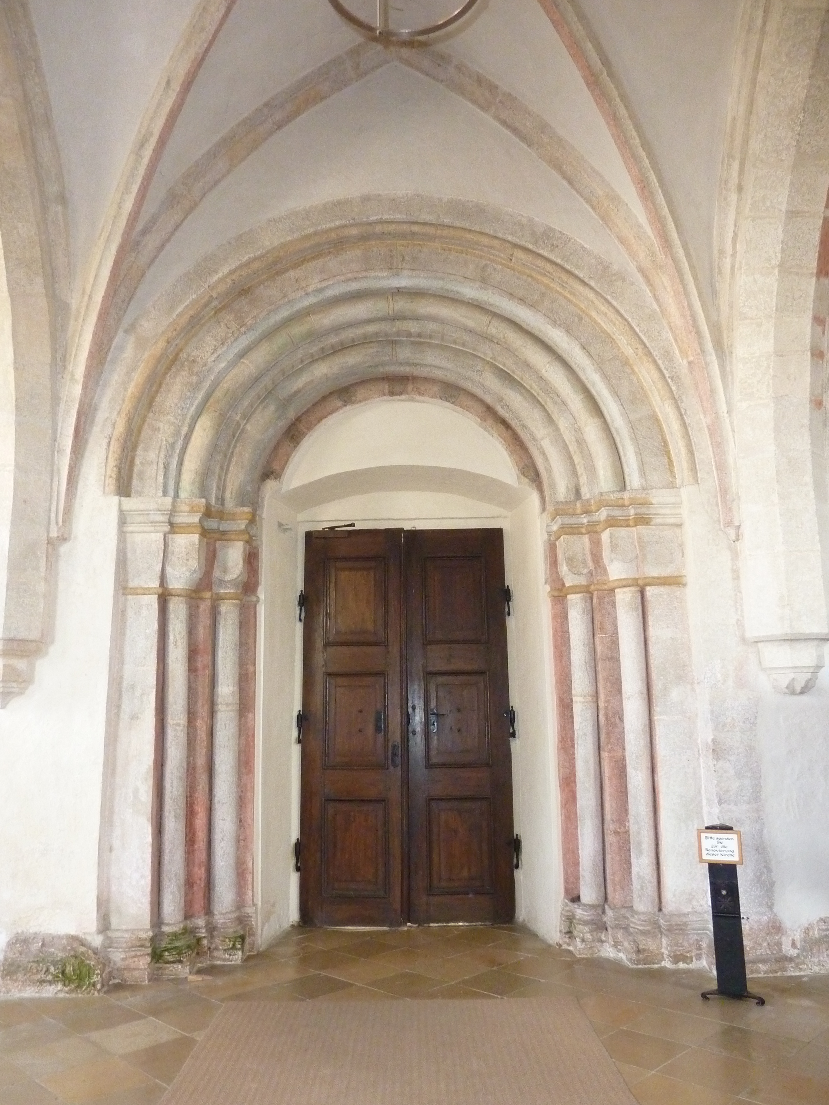 Pfarrkirche Mariä Himmelfahrt, ehem. Zisterzienserstiftskirche, Stift Baumgartenberg, Oberösterreich - romanisches Portal von der frühgotischen Kirchenvorhalle zur Kirche